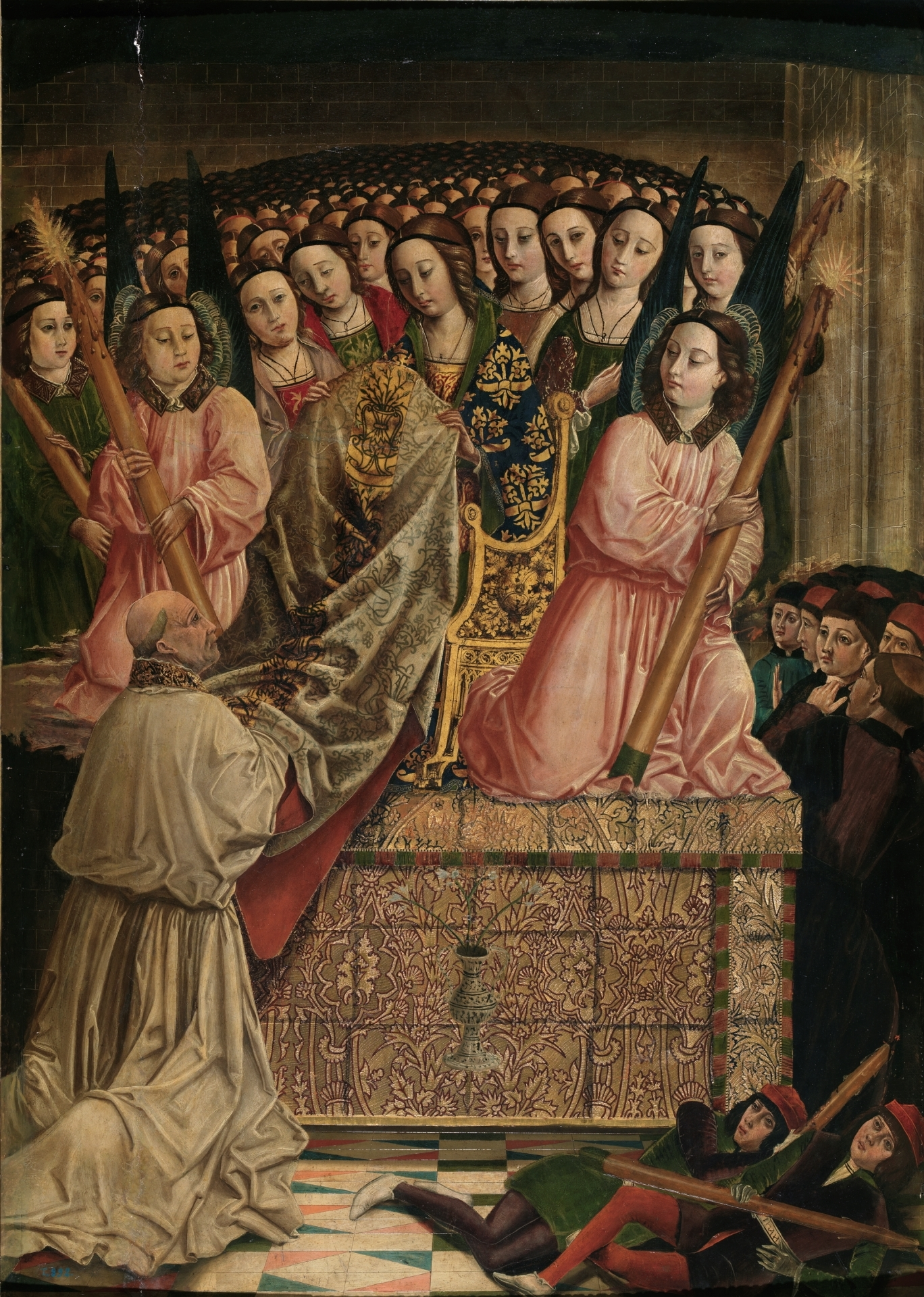 La obra representa la imposición de la casulla a San Ildefonso de Toledo (607-667), que fue arzobispo de Toledo.